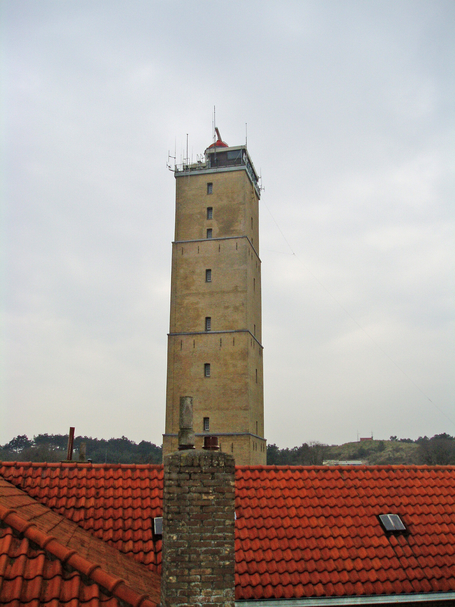 Brandaris